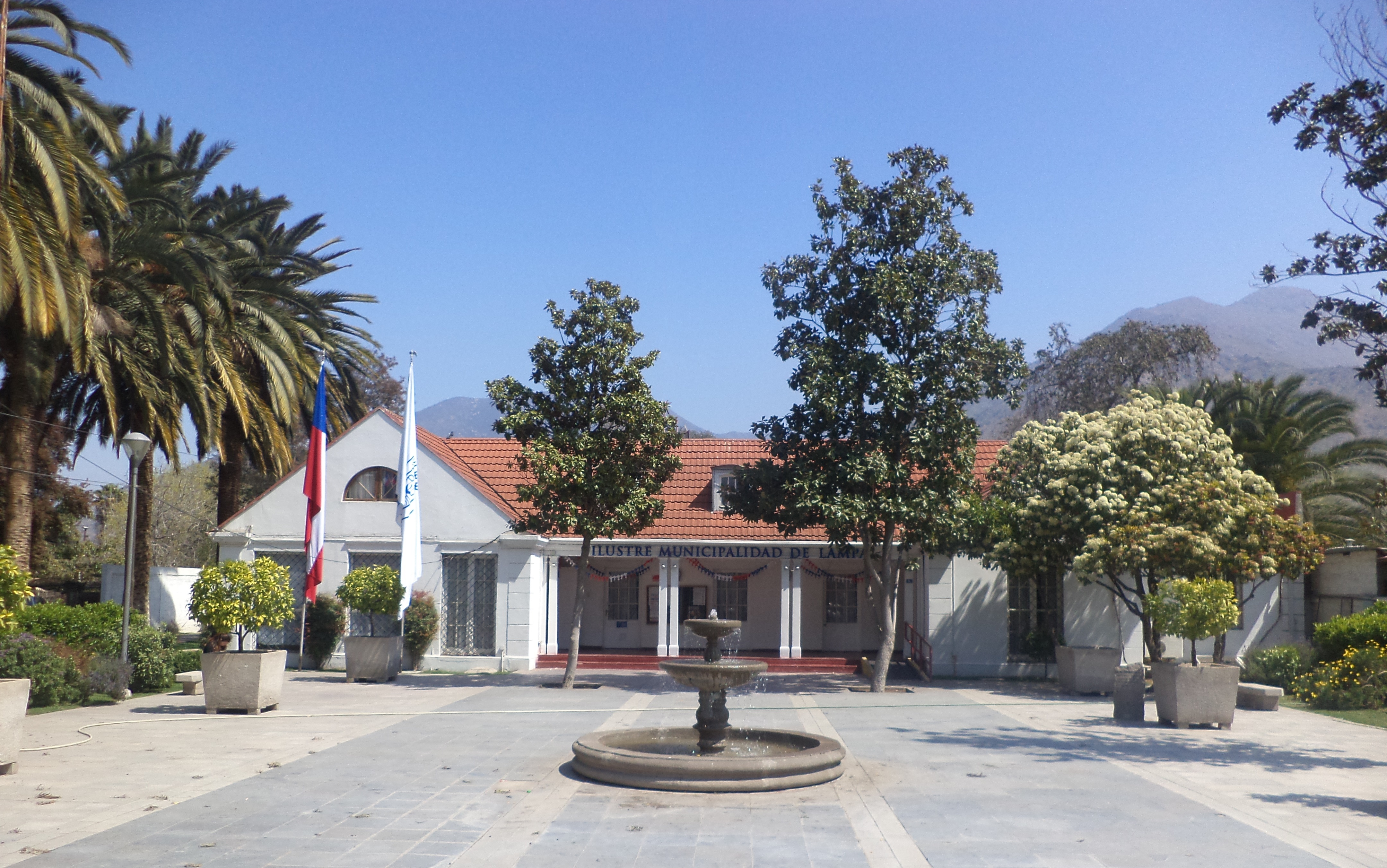 Municipalidad de la comuna de Lampa, provincia de Chacabuco, Chile